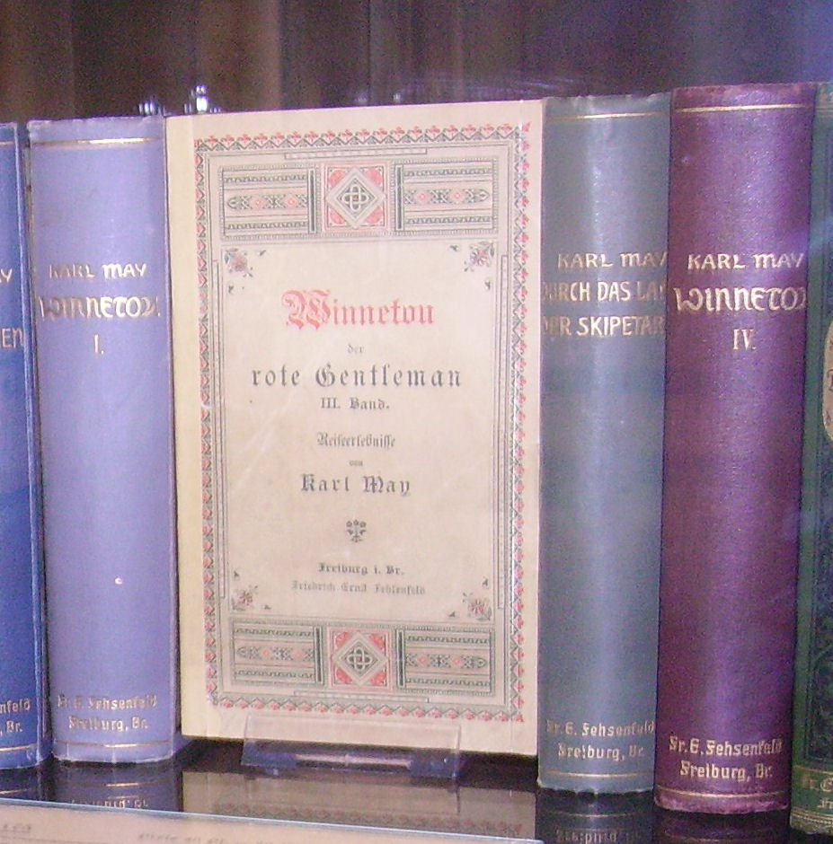 Books by Karl May in the Karl-May-Museum in Radebeul (near Dresden, Germany)